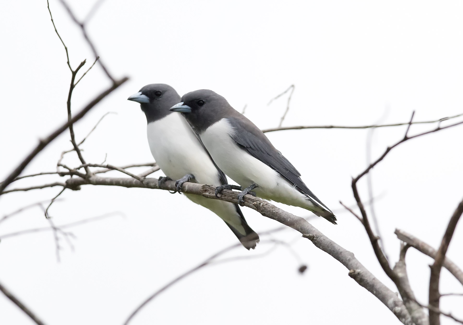 forgiven